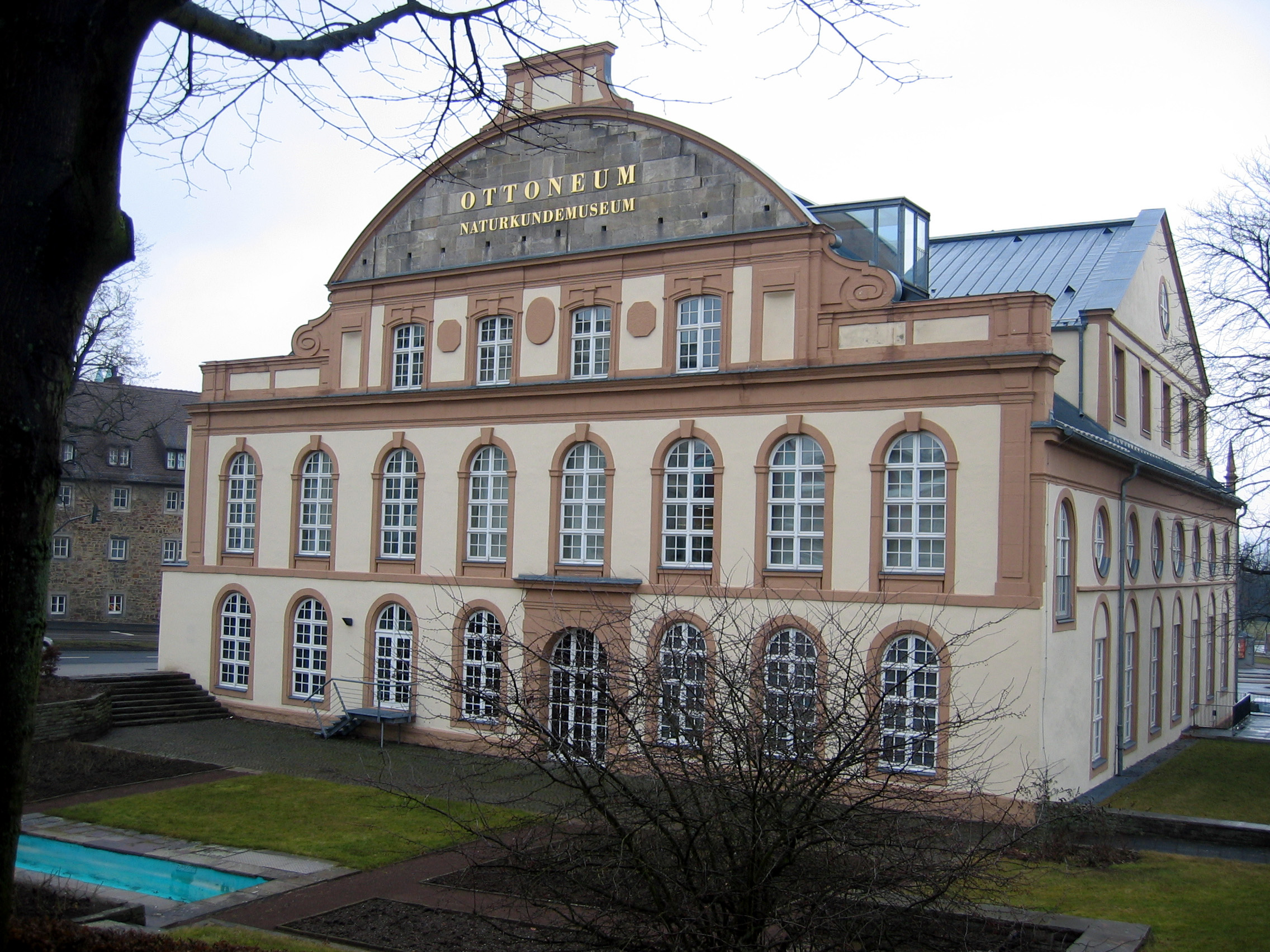 Kassel, Naturkundemuseum Ottoneum